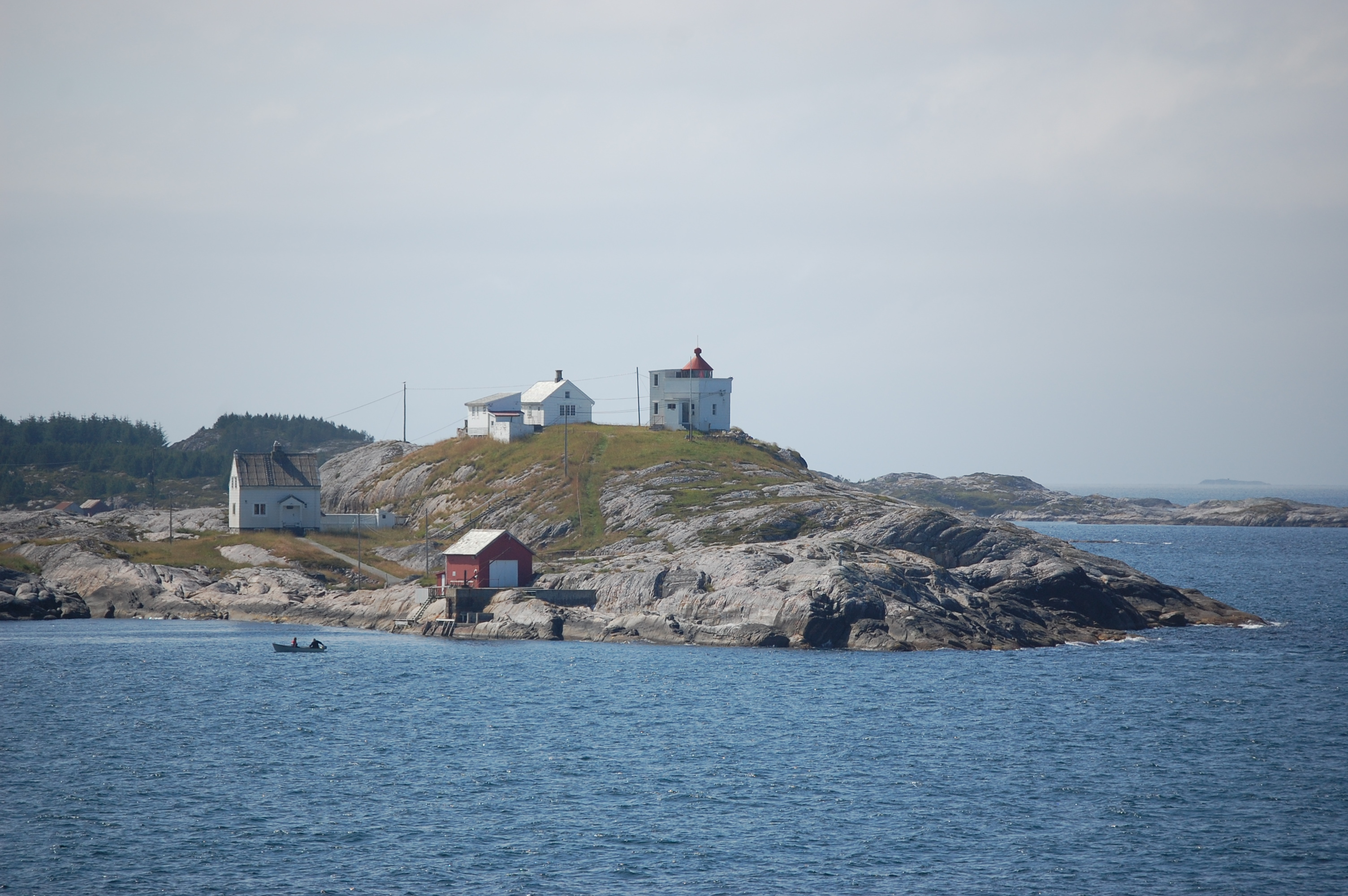 Stavenes fyrstasjon